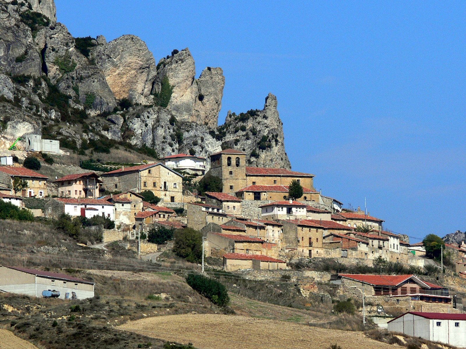 Cellorigo, La Rioja - España.